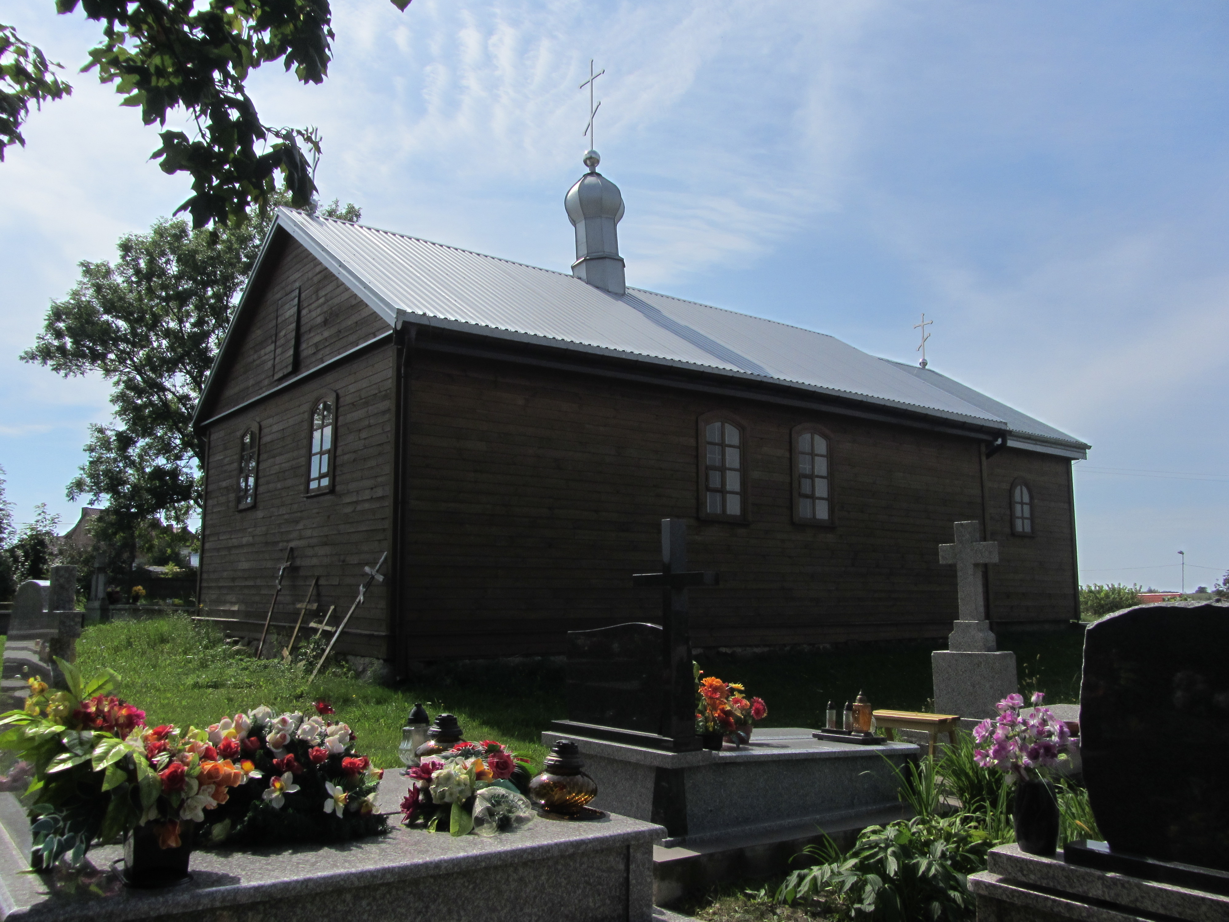 Zespół cerkwi cmentarnej p.w. św. Michała Archanioła: cerkiew p.w. św. Michała Archanioła cmentarz prawosławny Fasty, Dobrzyniewo Duże 12.2003.